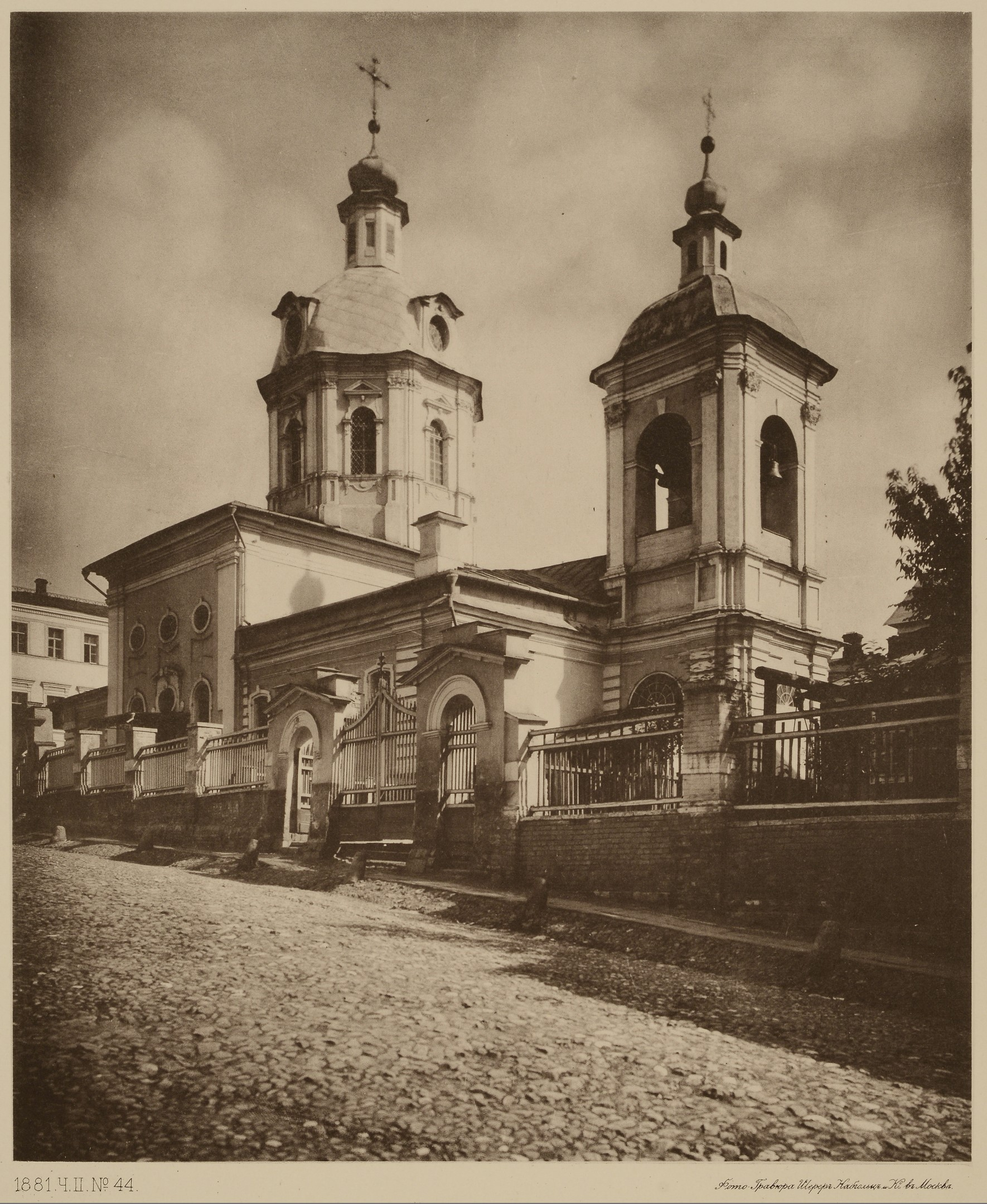 Храм Николая Чудотворца в Звонарях